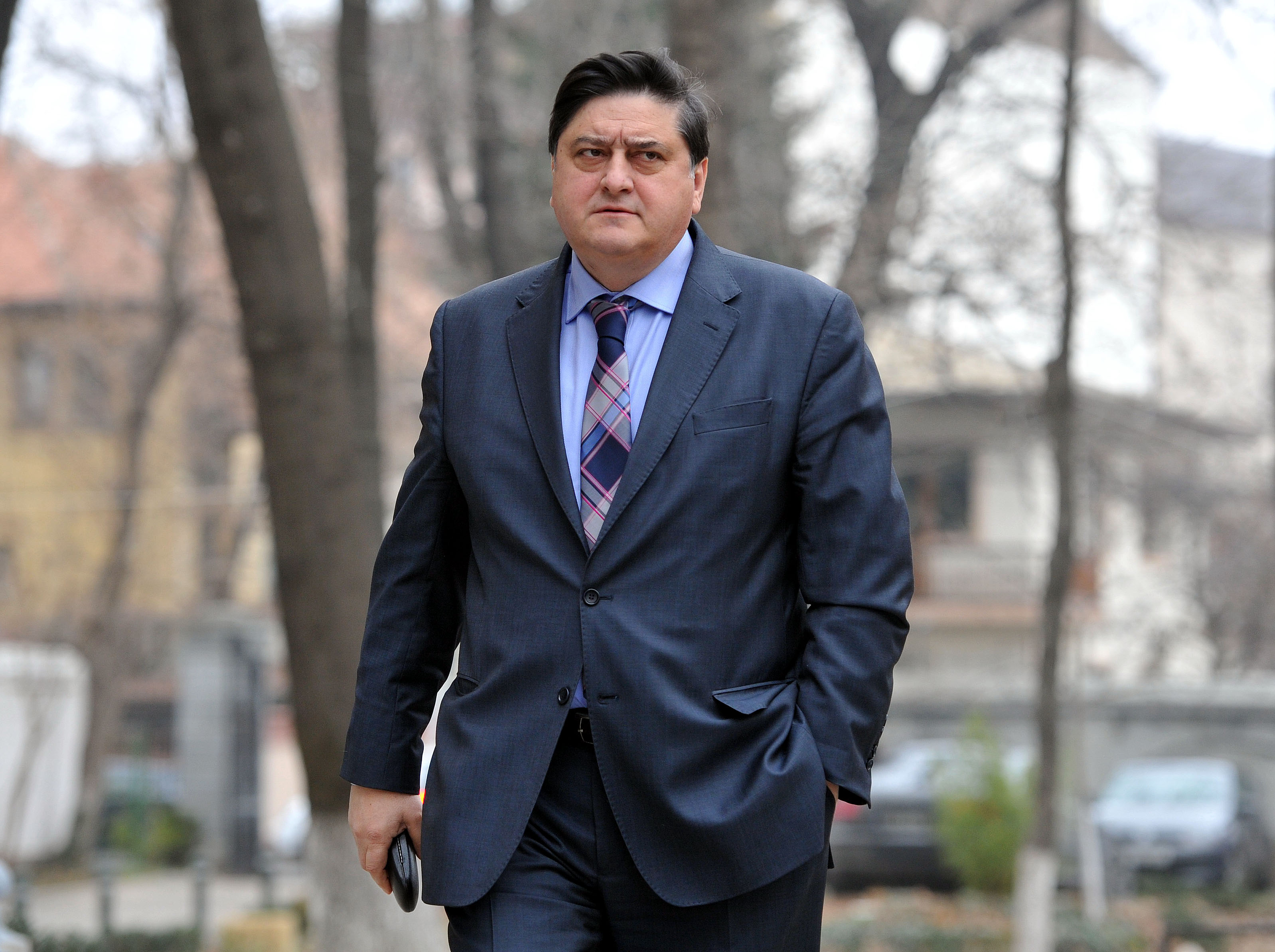 Constantin Nita, reuniunea BPN a PSD - 06.01.2014